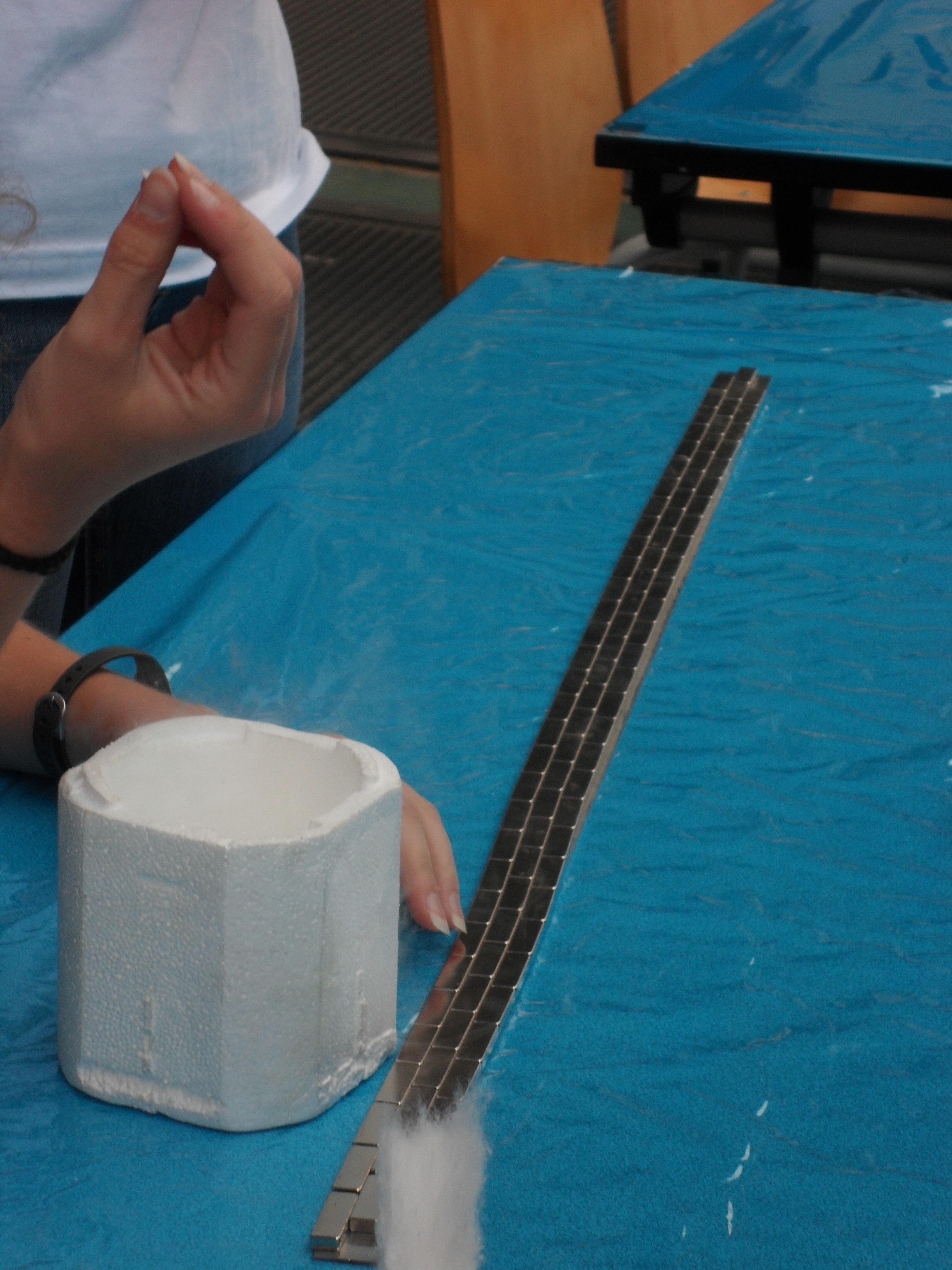 Stand sur la supraconductivité avec iode + aimant Festival Paris-Montagne 2011